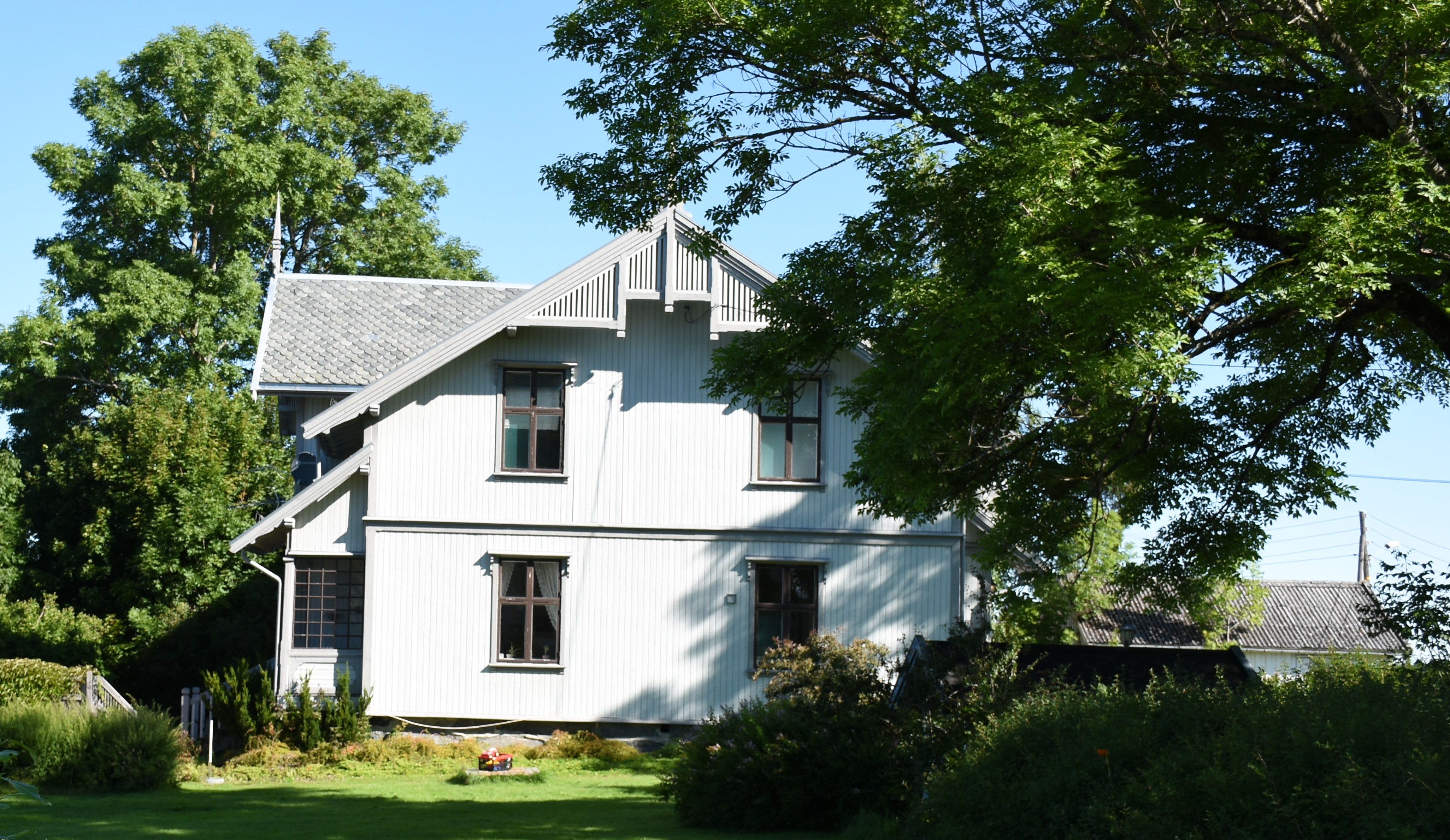 Hovedbygning på Fet prestegård